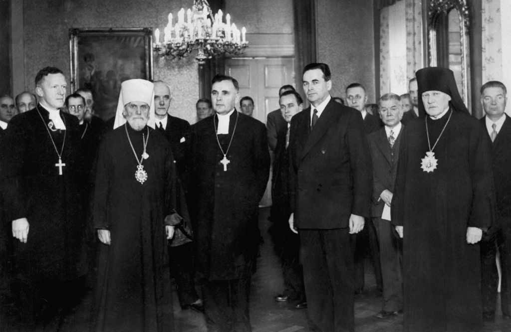 Kirkko ja valtio kohtaavat valtioneuvoston juhlahuoneistossa 8.10.1945. Eturivissä ev.-lut. piispa Eelis Gulin (vas.), metropoliitta Grigori, ev.-lut. arkkipiispa Aleksi Lehtonen, sisäasiainministeri Yrjö Leino ja piispa Aleksanteri.